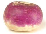 turnip